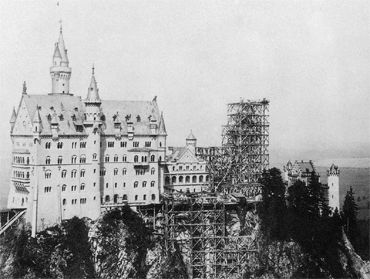 Schloss Neuschwanstein